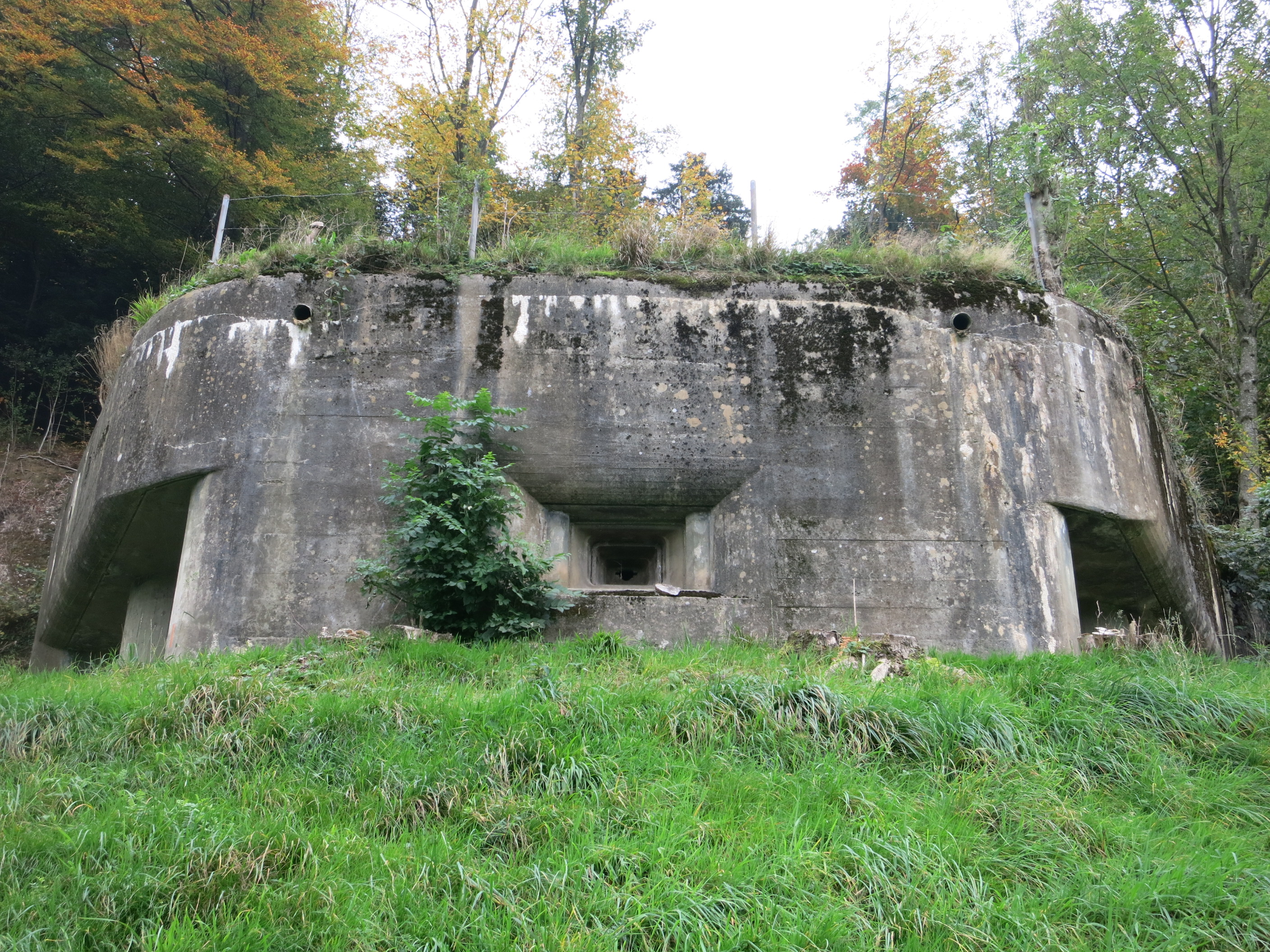 Sperrstelle Oberarth SZ, Schweiz